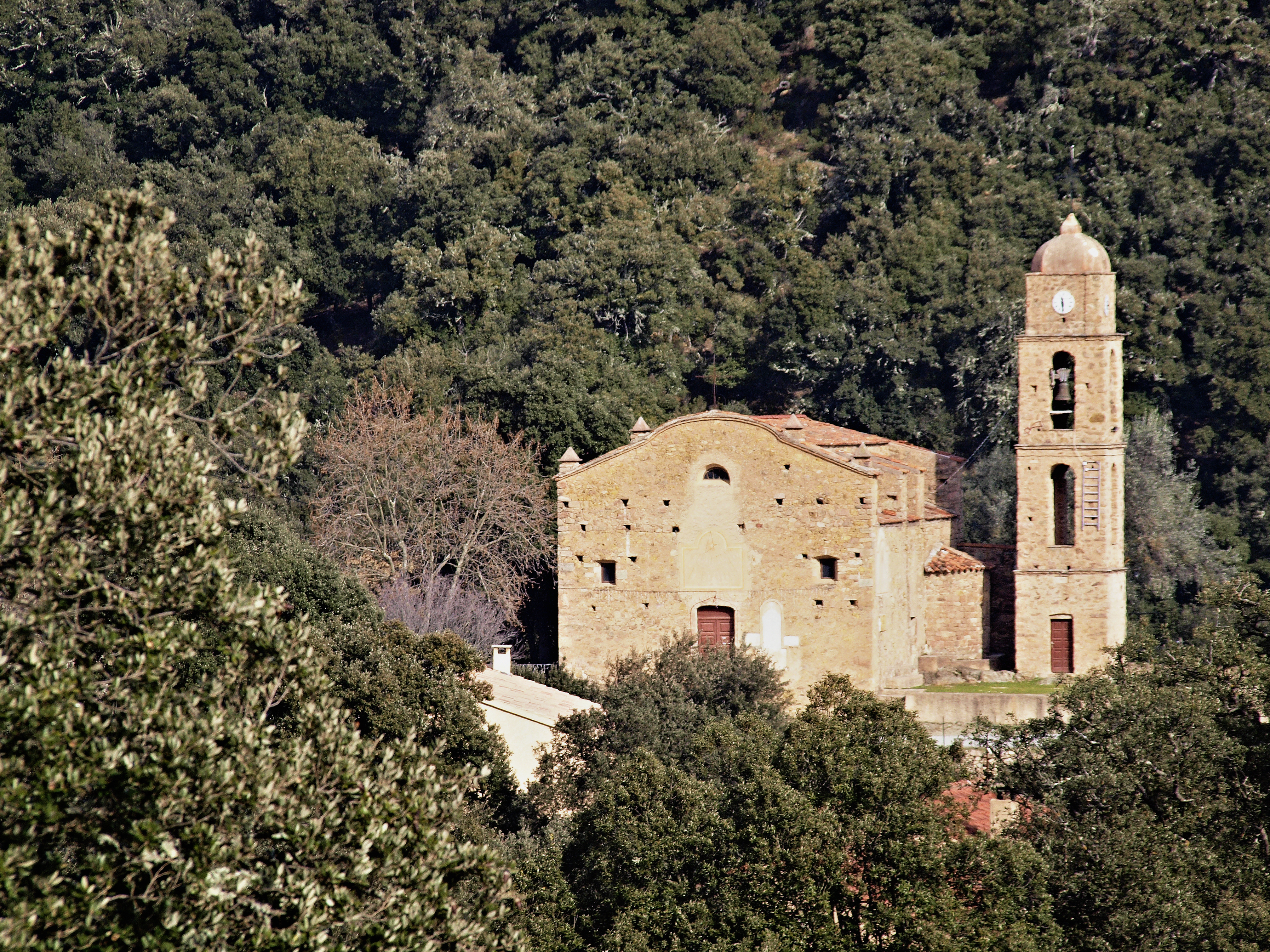 Piedigriggio (Haute-Corse) - Église Saint-Michel